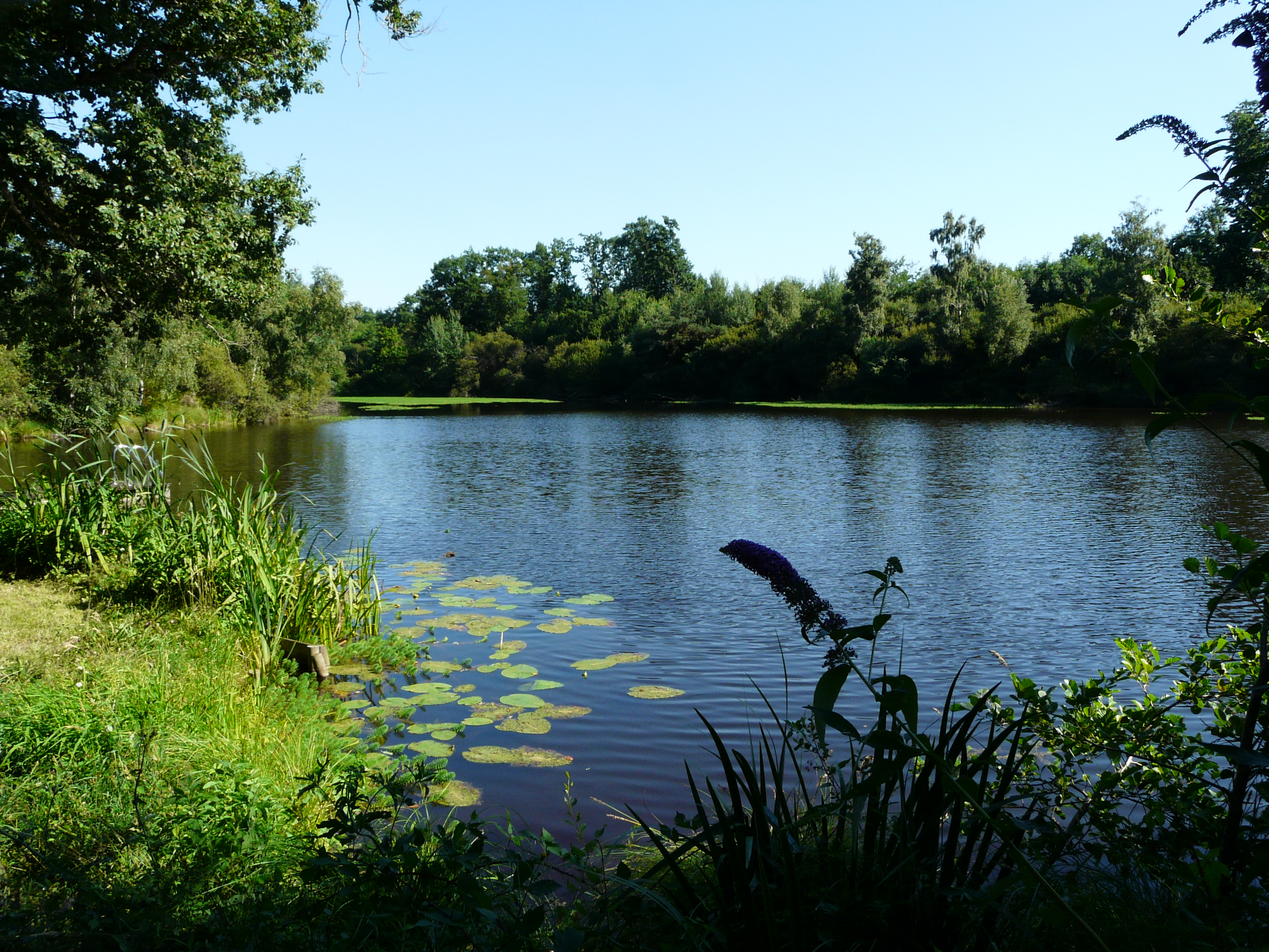 Un étang au bord du GR 4, entre les Chareyroux et la Forêt, Busserolles, Dordogne, France.